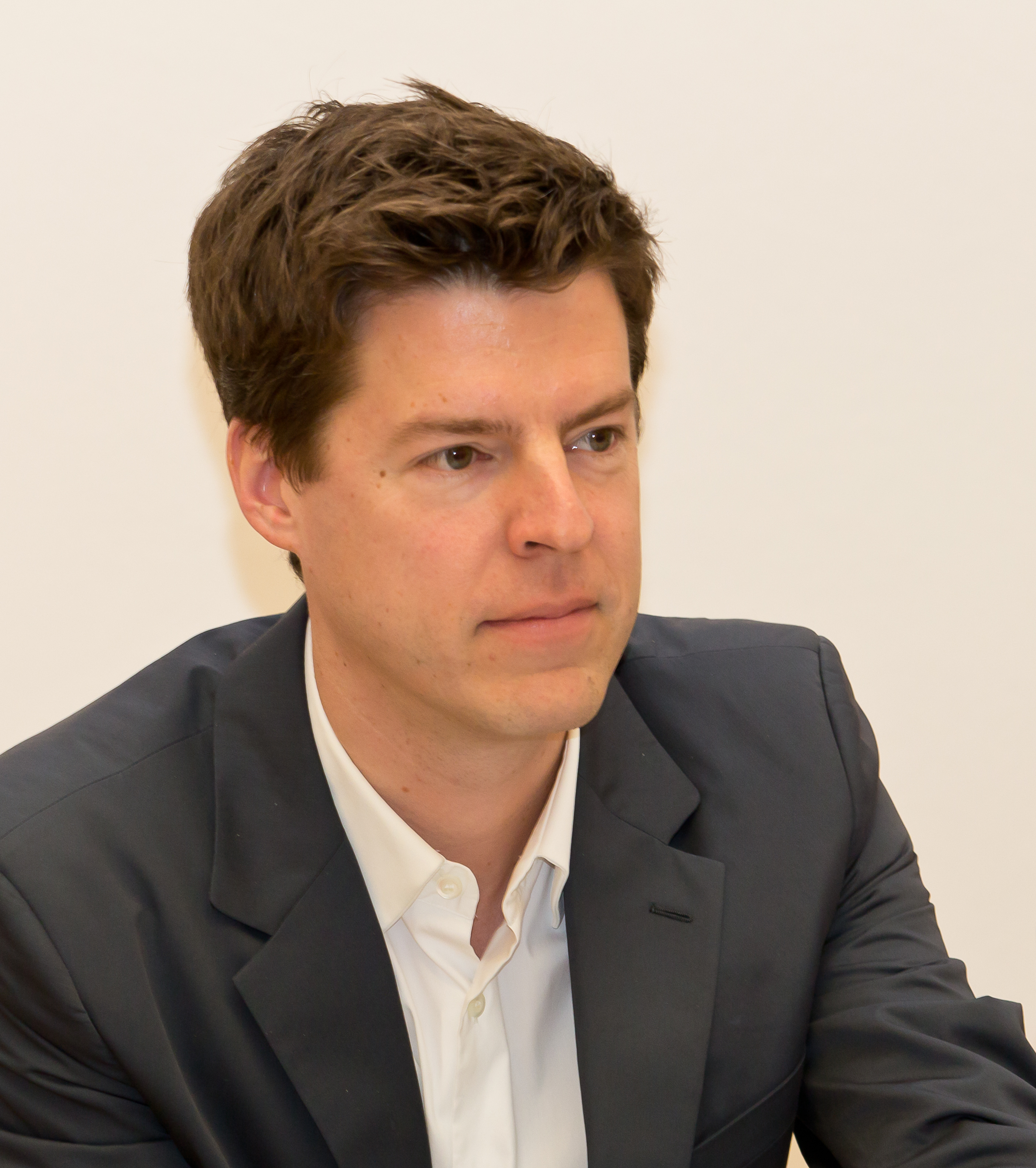 Pressegespräch im Museum Ludwig, Köln, zu der Ausstellung „Saul Steinberg: The Americans“ Foto: Philipp Kaiser, Direktor Museum Ludwig